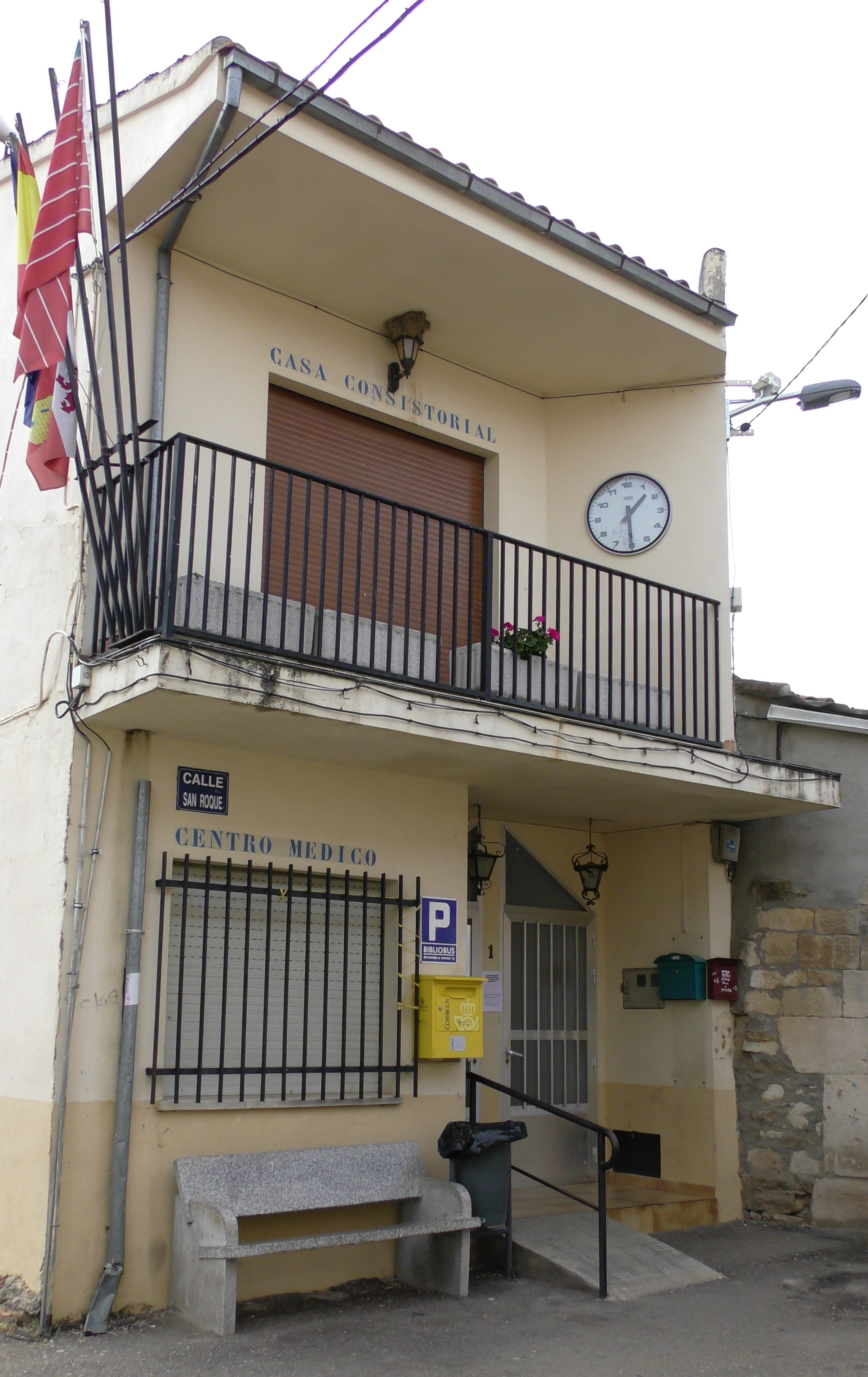 Mayalde